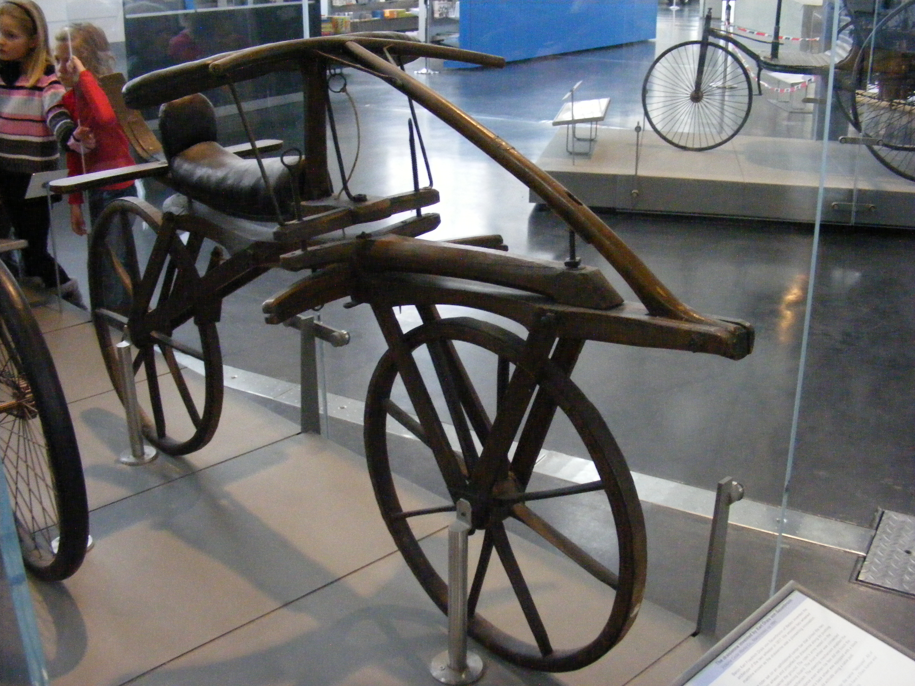 Laufmaschine des Karl Drais, 1817 — Exponat im Deutschen Museum Verkehrszentrum München